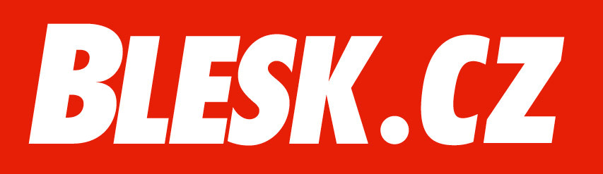 Blesk logo